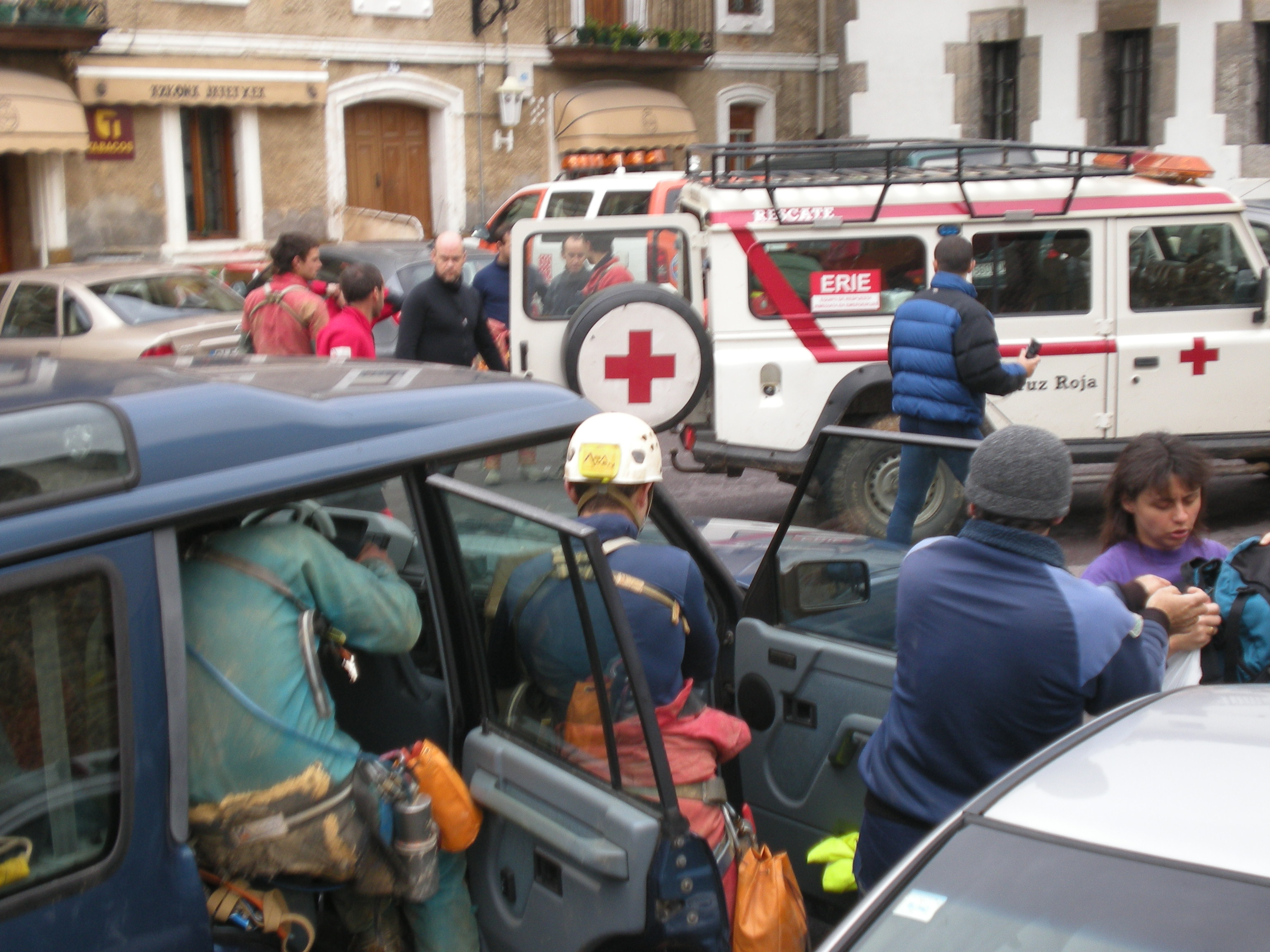 Euskal Espeleo Laguntza taldearen simulakro orokorra 2010ean (Artekonako leizea, Galdames, Bizkaia).